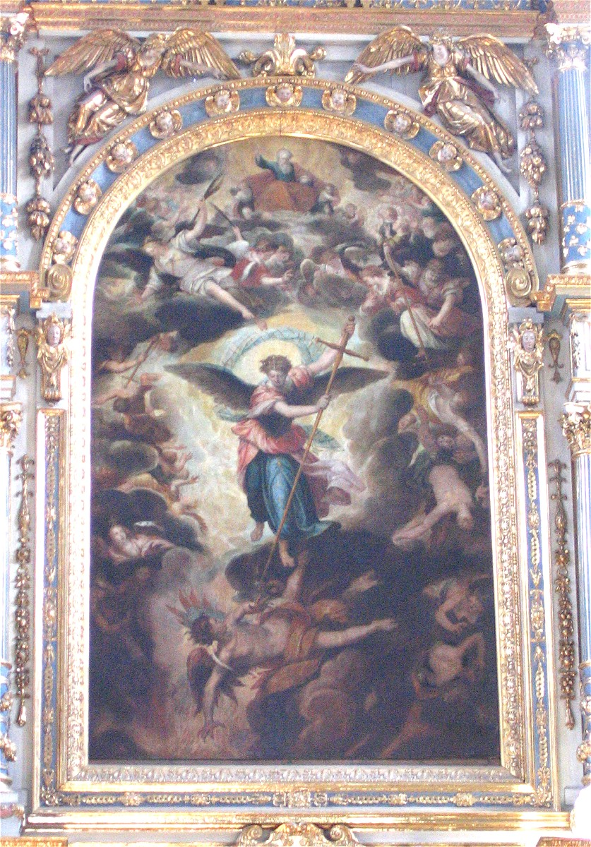 St. Michael (München), Hochaltarbild